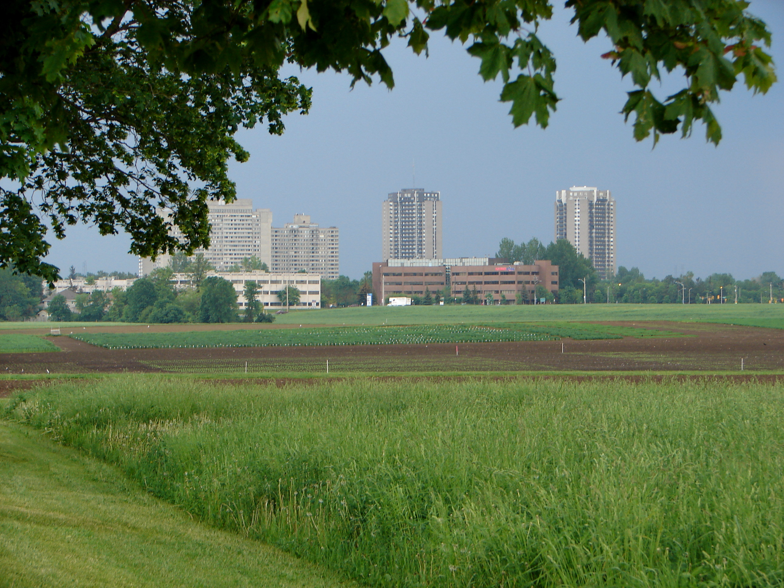 Central Experimental Farm in Ottawa, Ontario, Canada